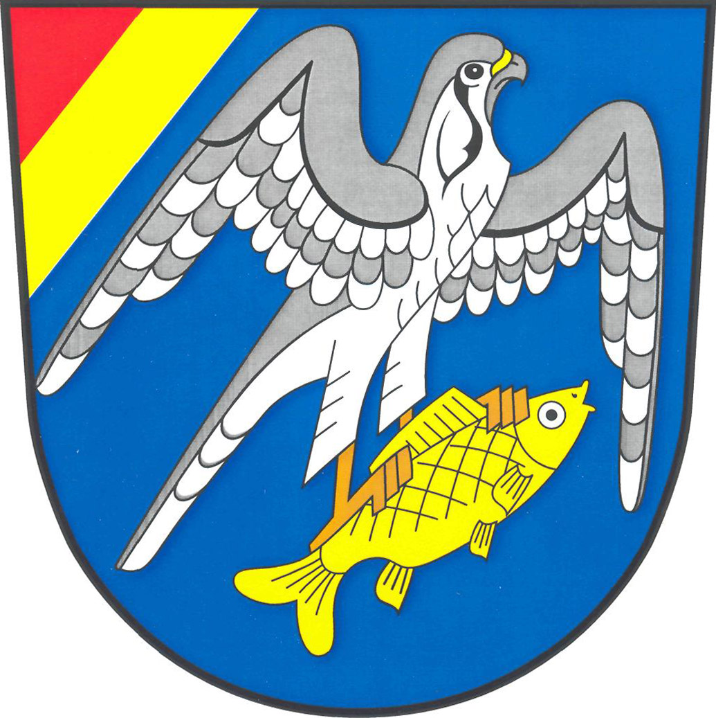 Znak obce Břežany II